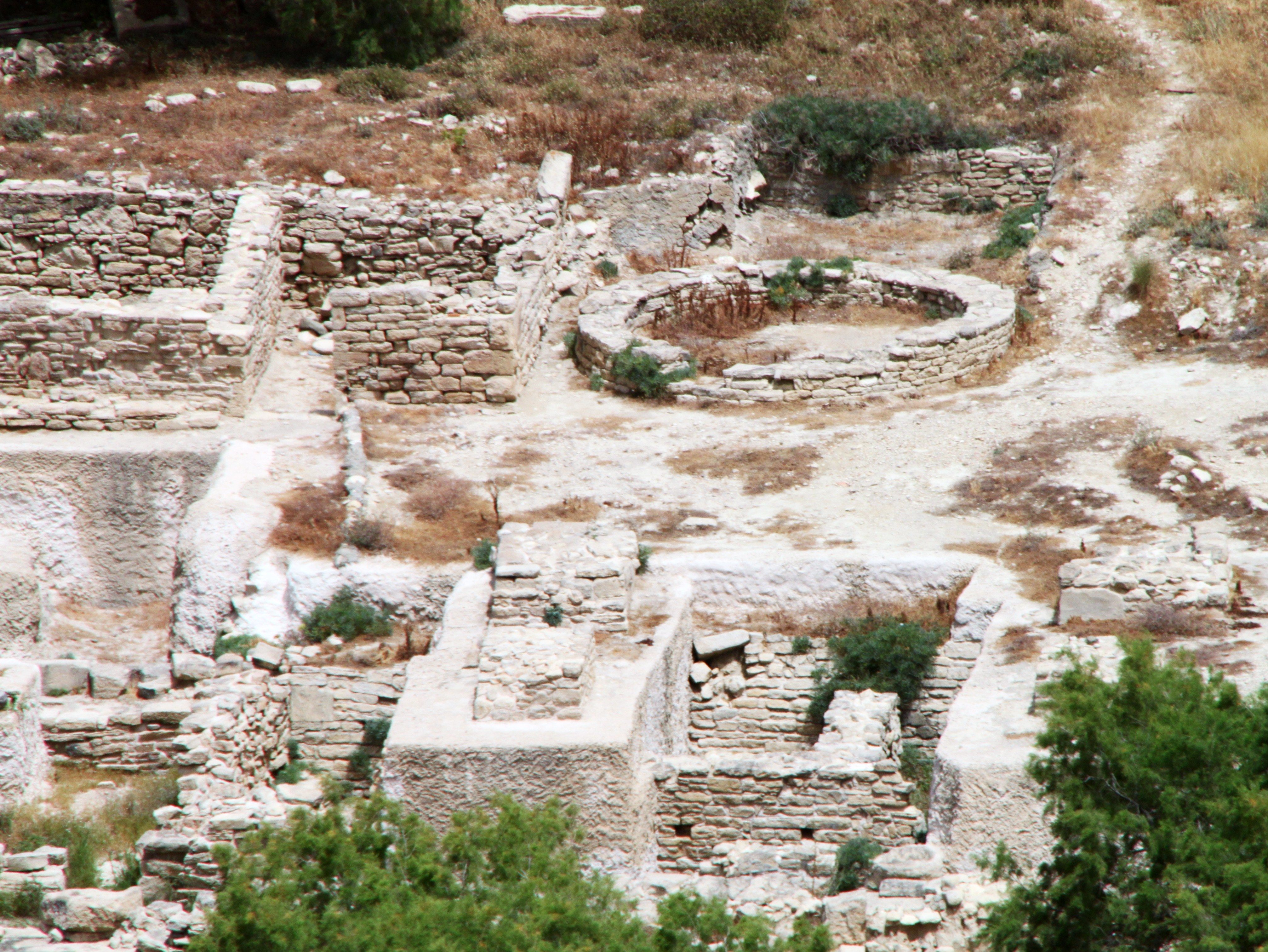 Ausgrabungsstätte der antiken Küstensiedlung Komos (auch Kommos), Gemeinde Tymbaki, Präfektur Iraklio, Kreta, Griechenland